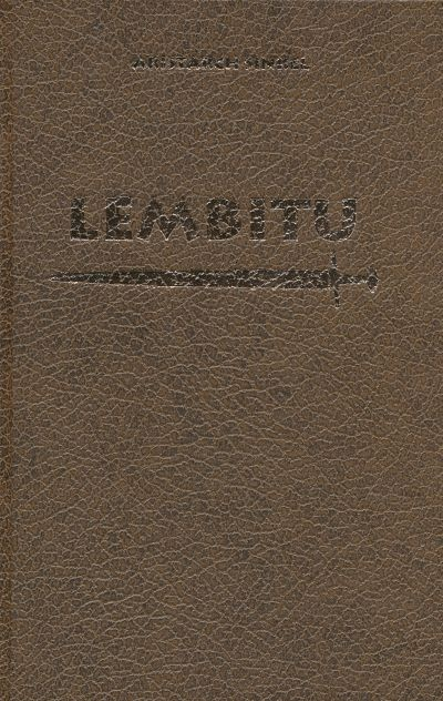 Aristarch Sinkeli romaani "Lembitu" esikülg